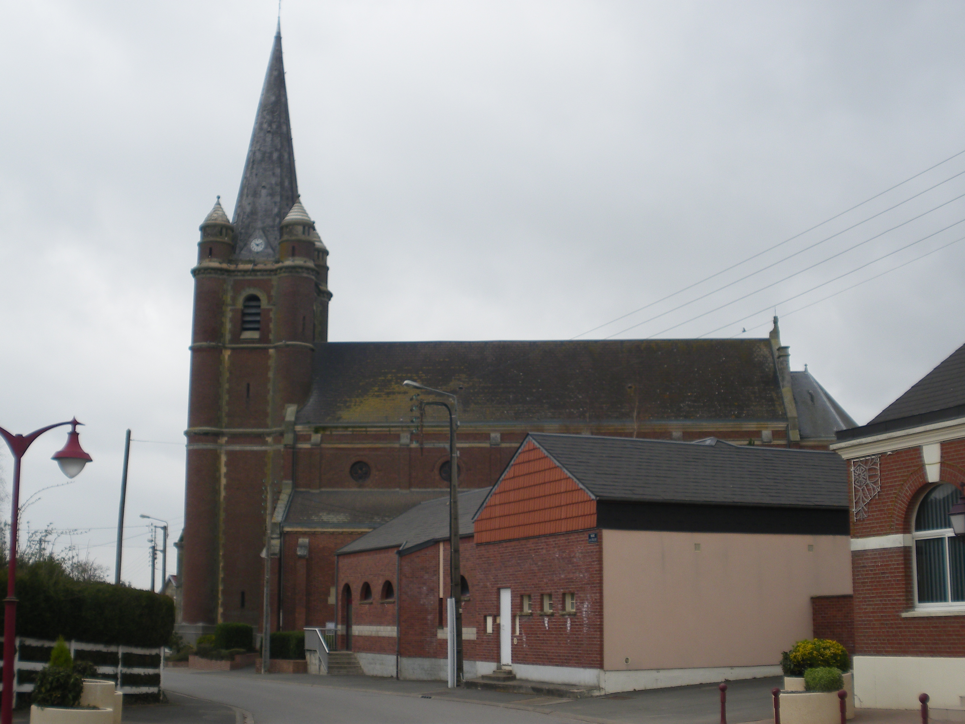 Vue de l'église Saint-Martin de Graincourt-lès-Havrincourt.